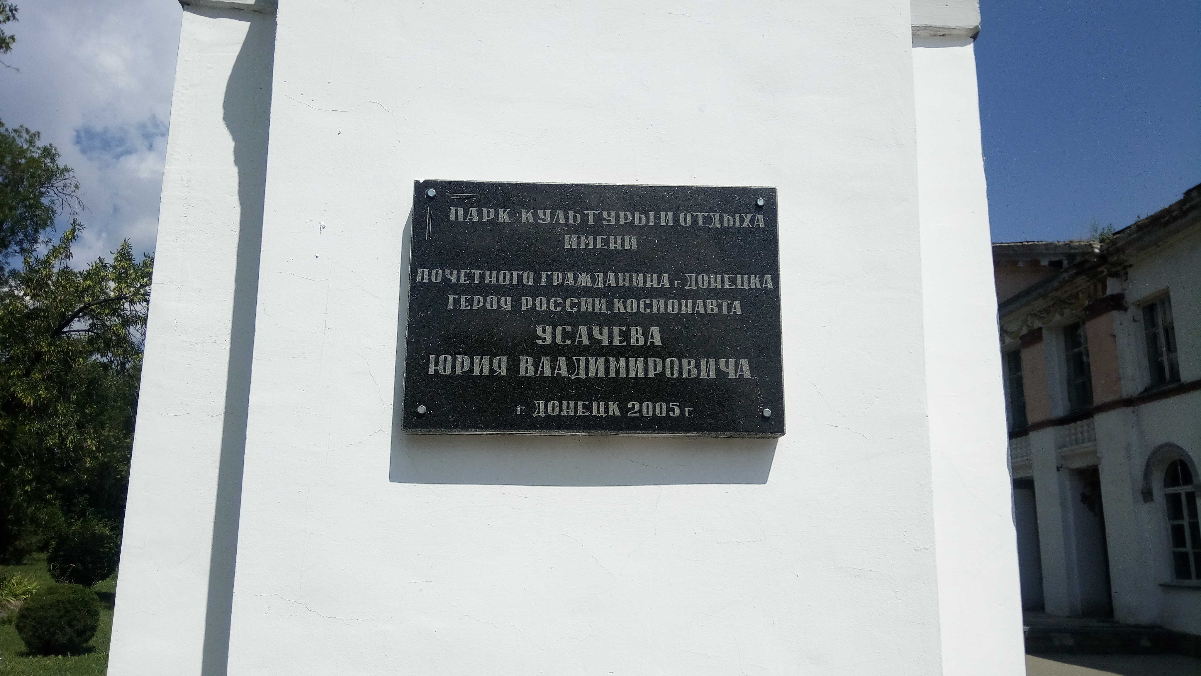 Таблица при входе в парк Усачёва (Донецк РФ)